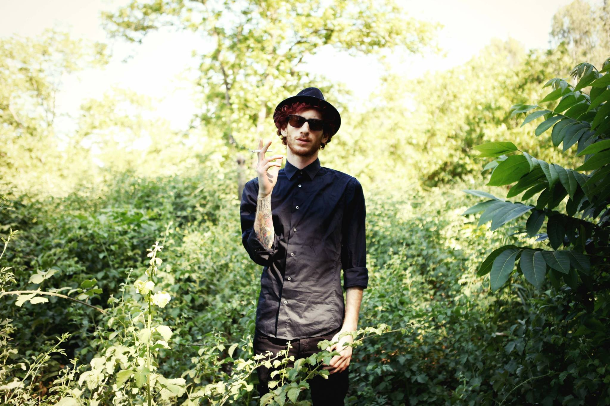 אלישע בנאי-צילום אורית פניני